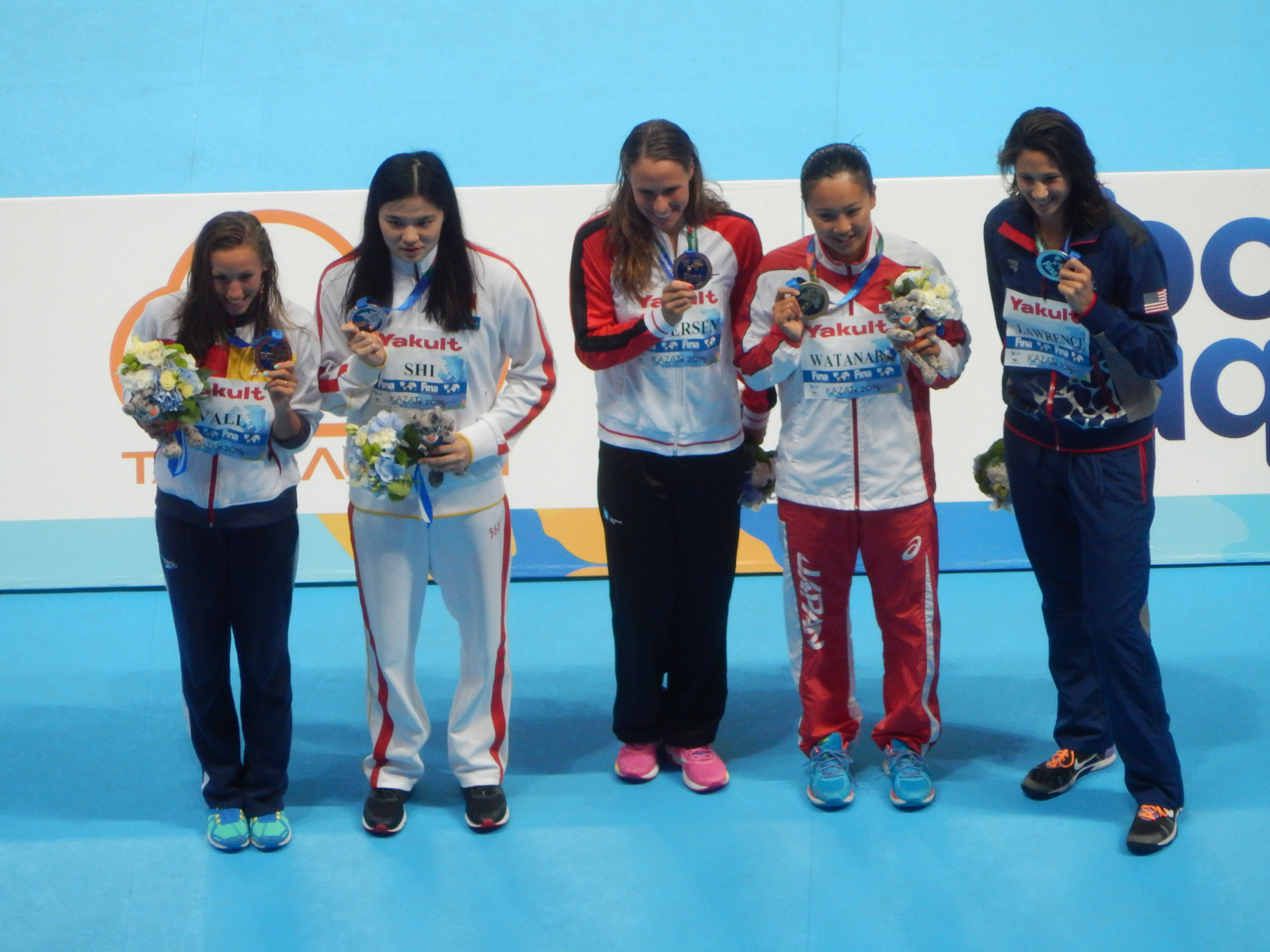 Медалисты чемпионата мира в Казани на дистанции 200 метров брассом у женщин